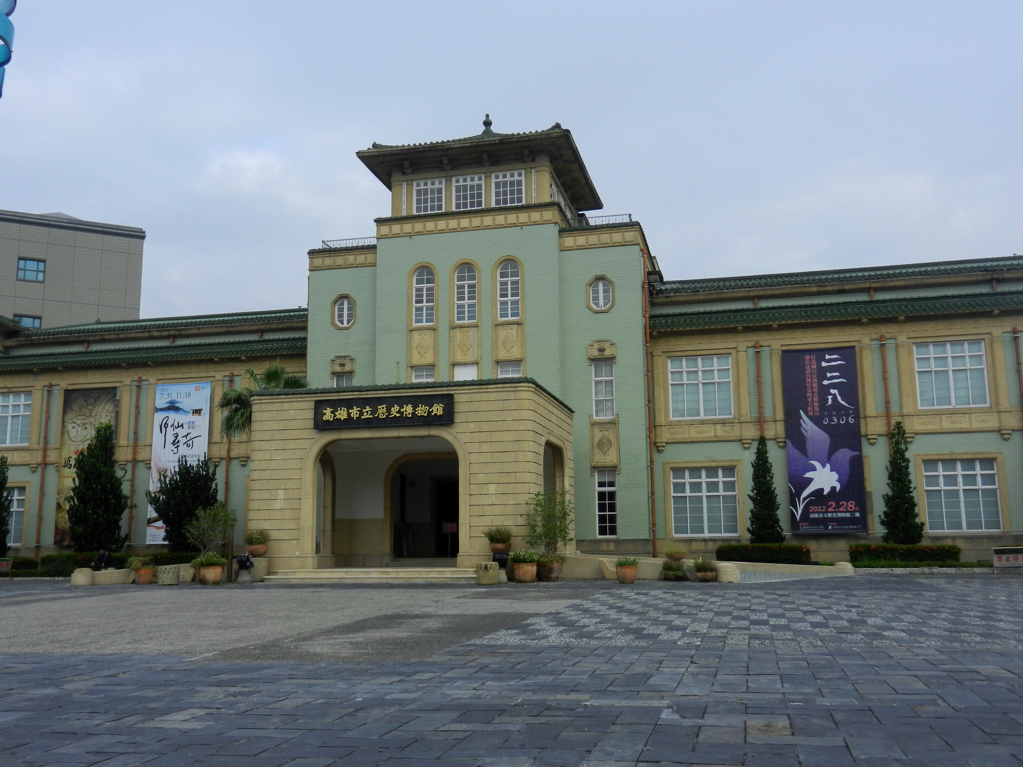 高雄市立歷史博物館正面。